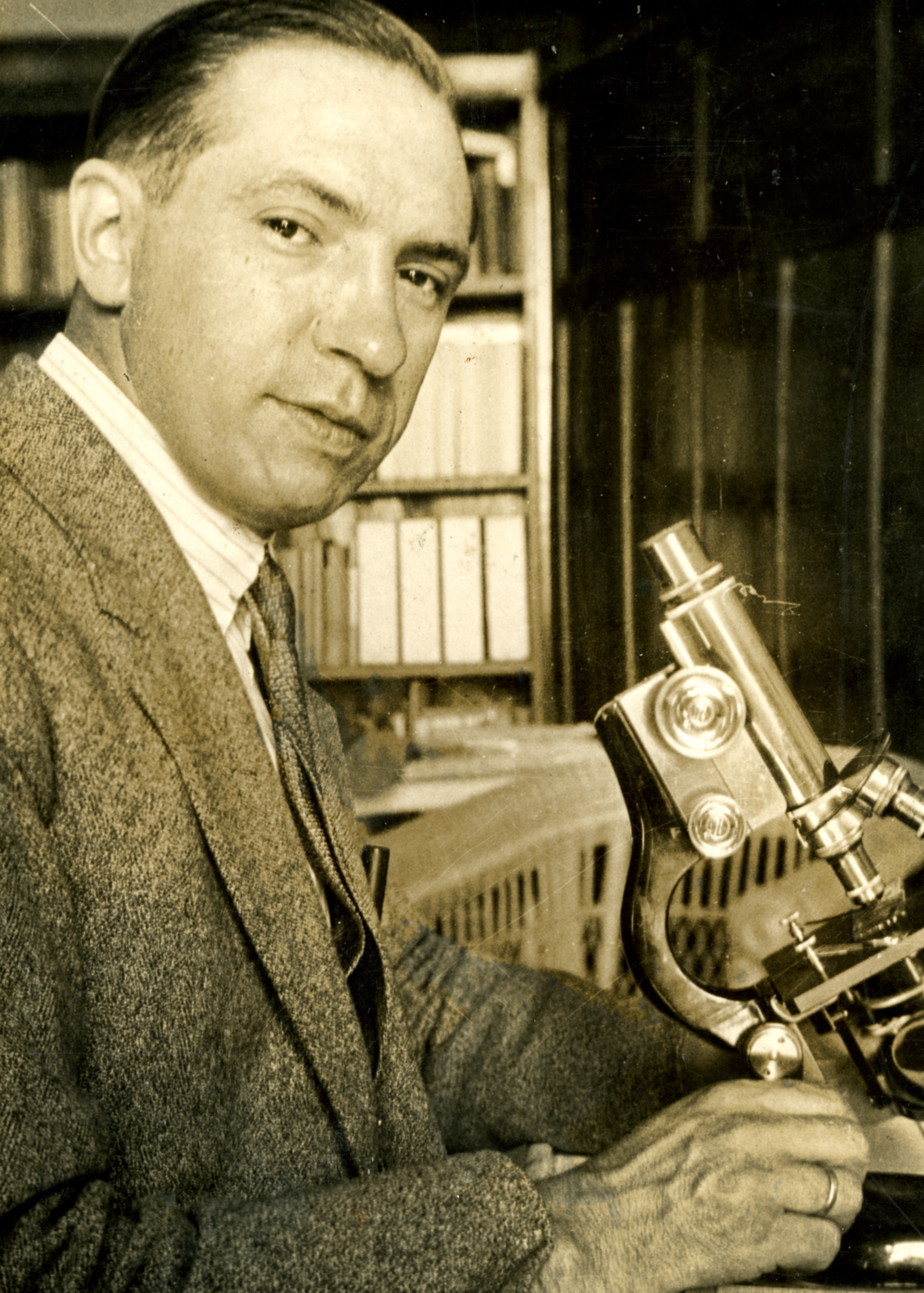 Santiagon, Misioaren lehen aldian